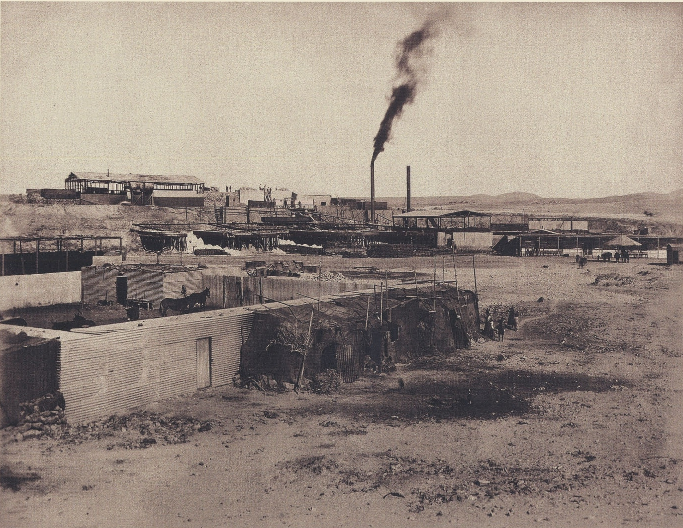 Oficina salitrera San José en La Noria, Chile.